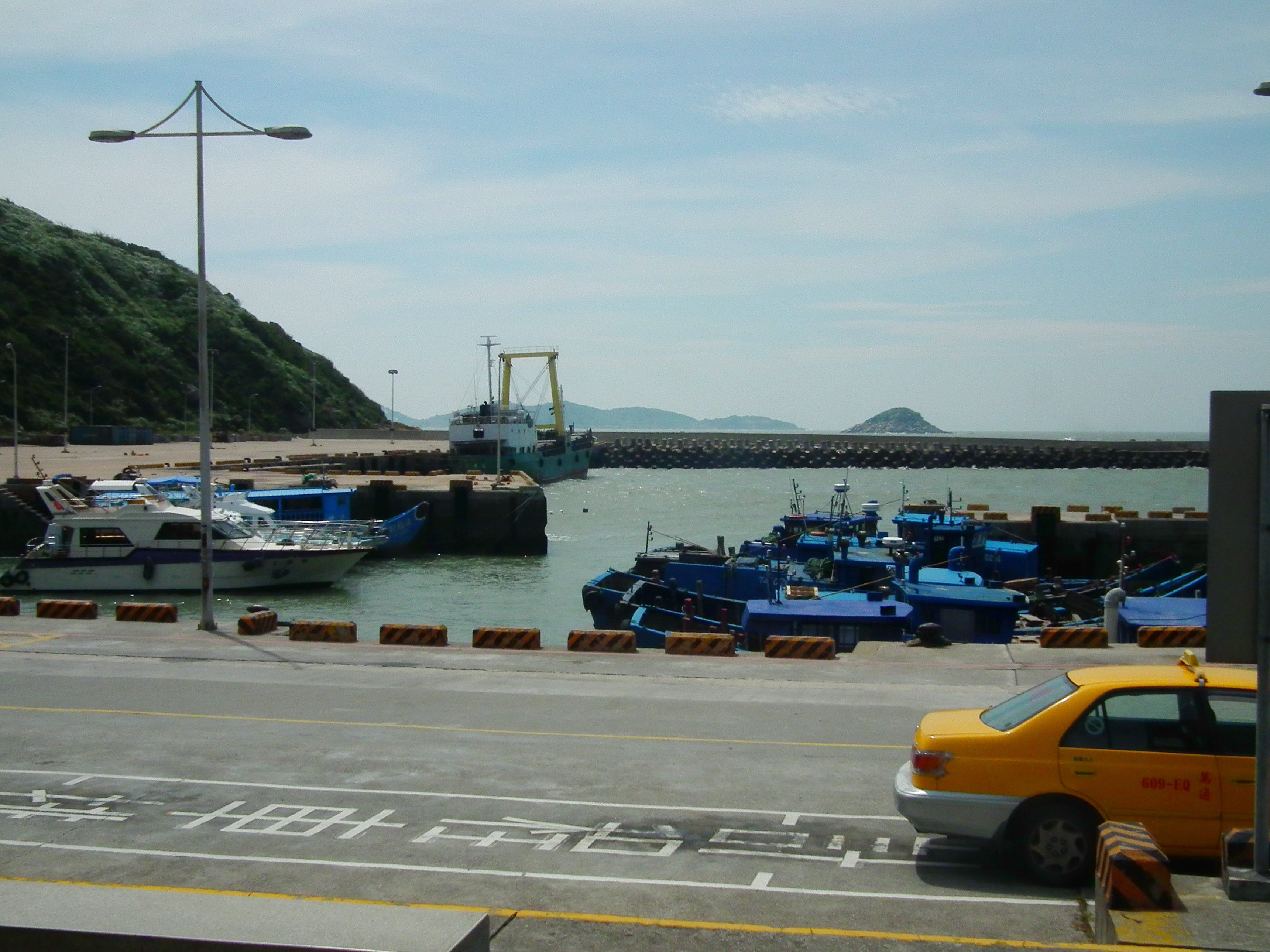 Baisha Harbor 白沙港